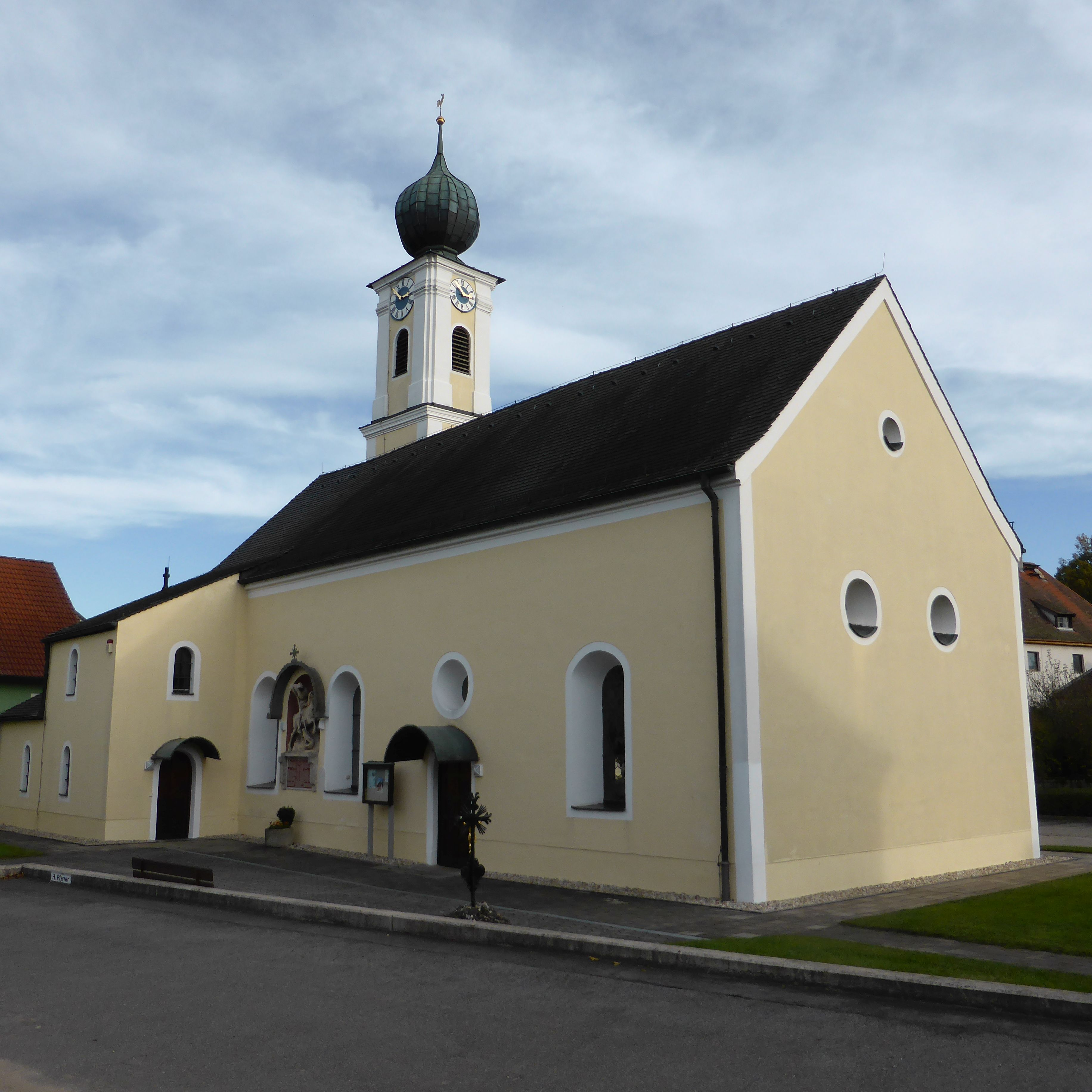 Holzheim am Forst (Bubach am Forst, Kirche St. Peter und Paul-1)